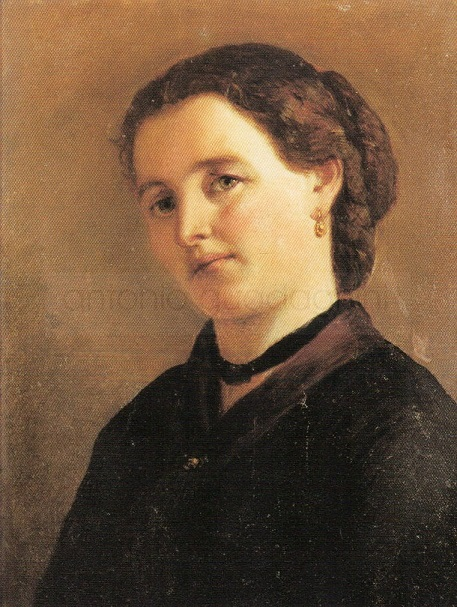 La nipote Chiara Guadagnini, olio su cartone, 45 x 35 cm., coll. privata